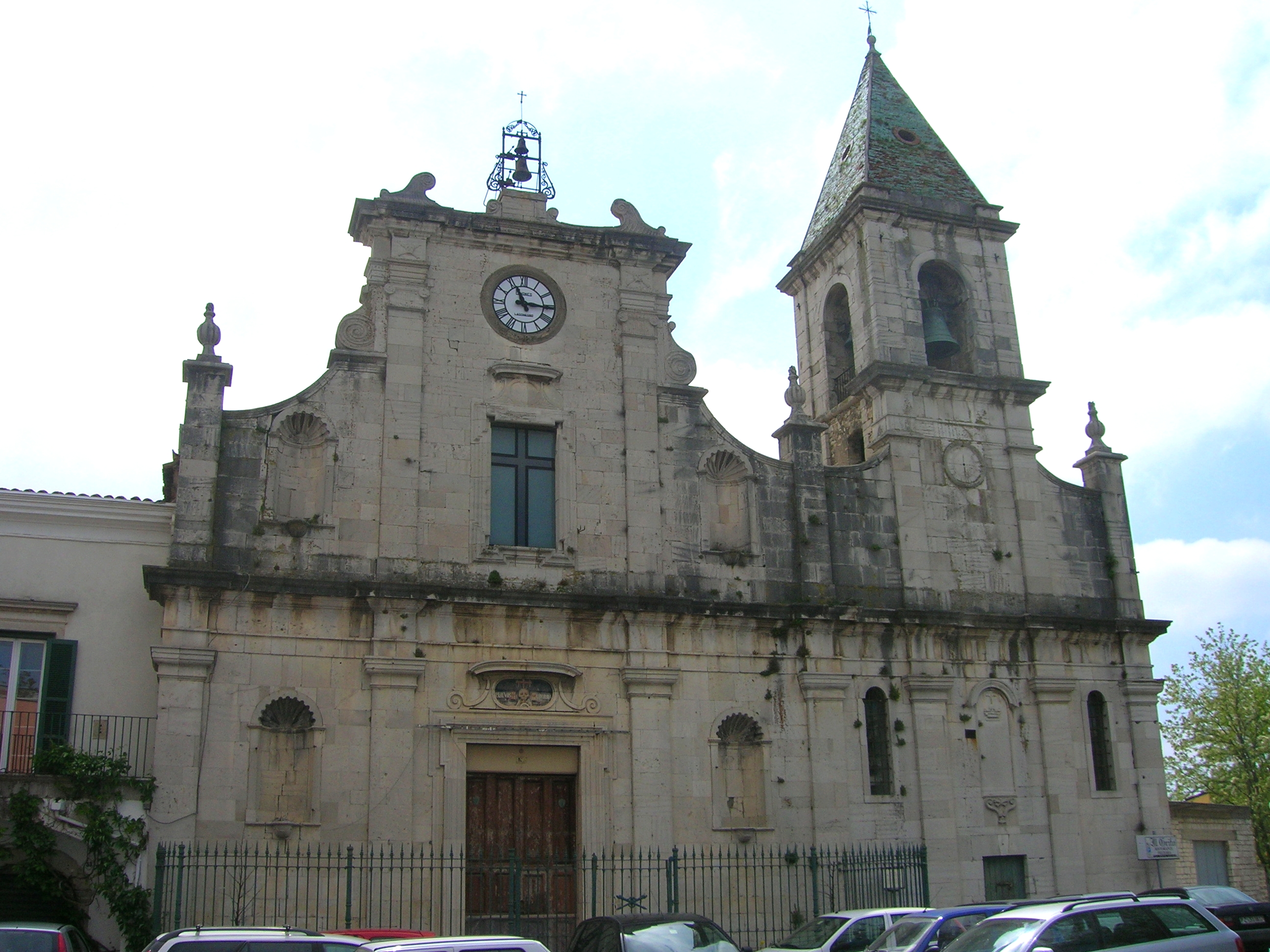 Chiesa del Purgatorio, Venosa (PZ)